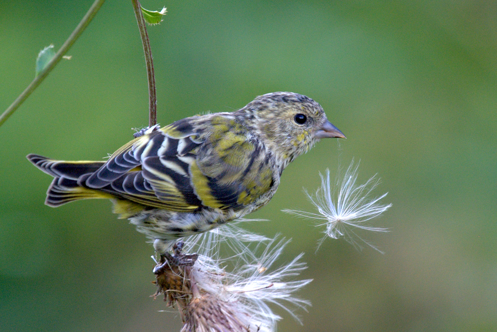 Vihervarpunen